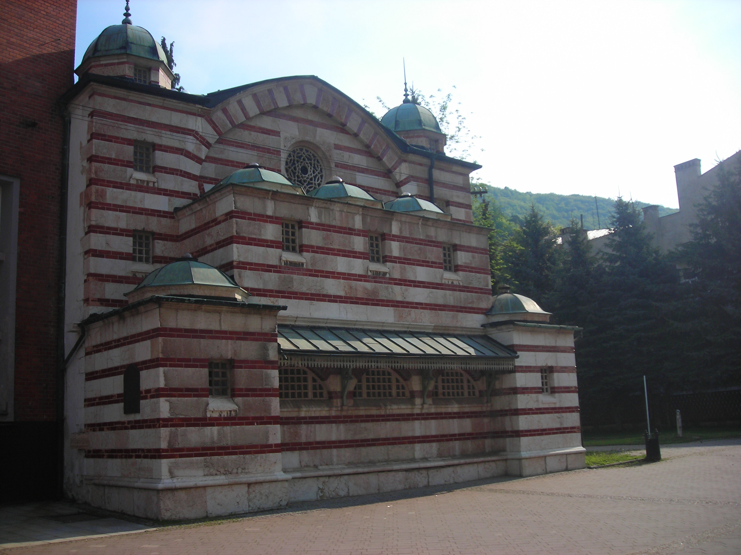 Turecký kúpeľňový dom Sina (Hammam) v Trenčianskych Tepliciach